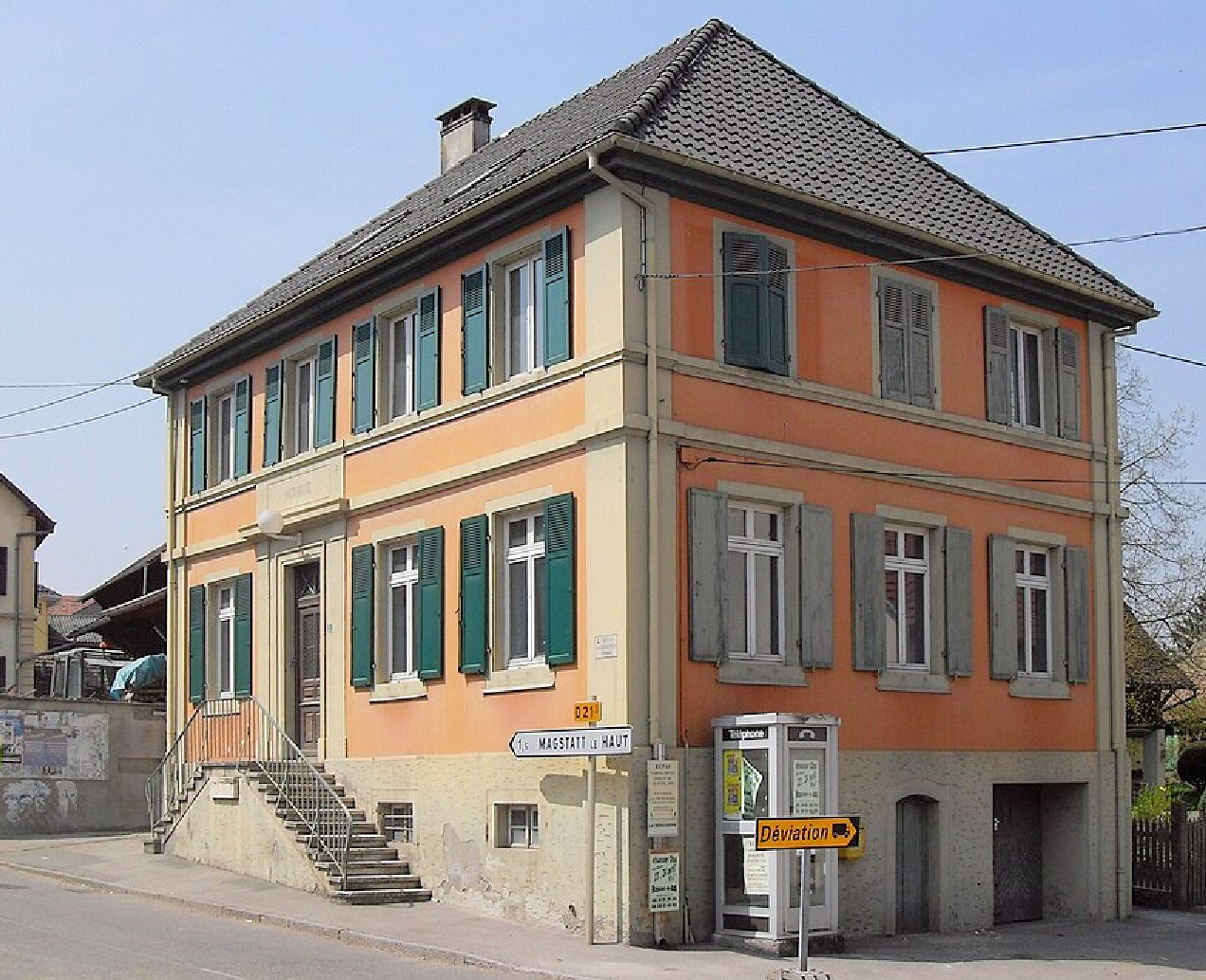 La mairie de Magstatt-le-Bas